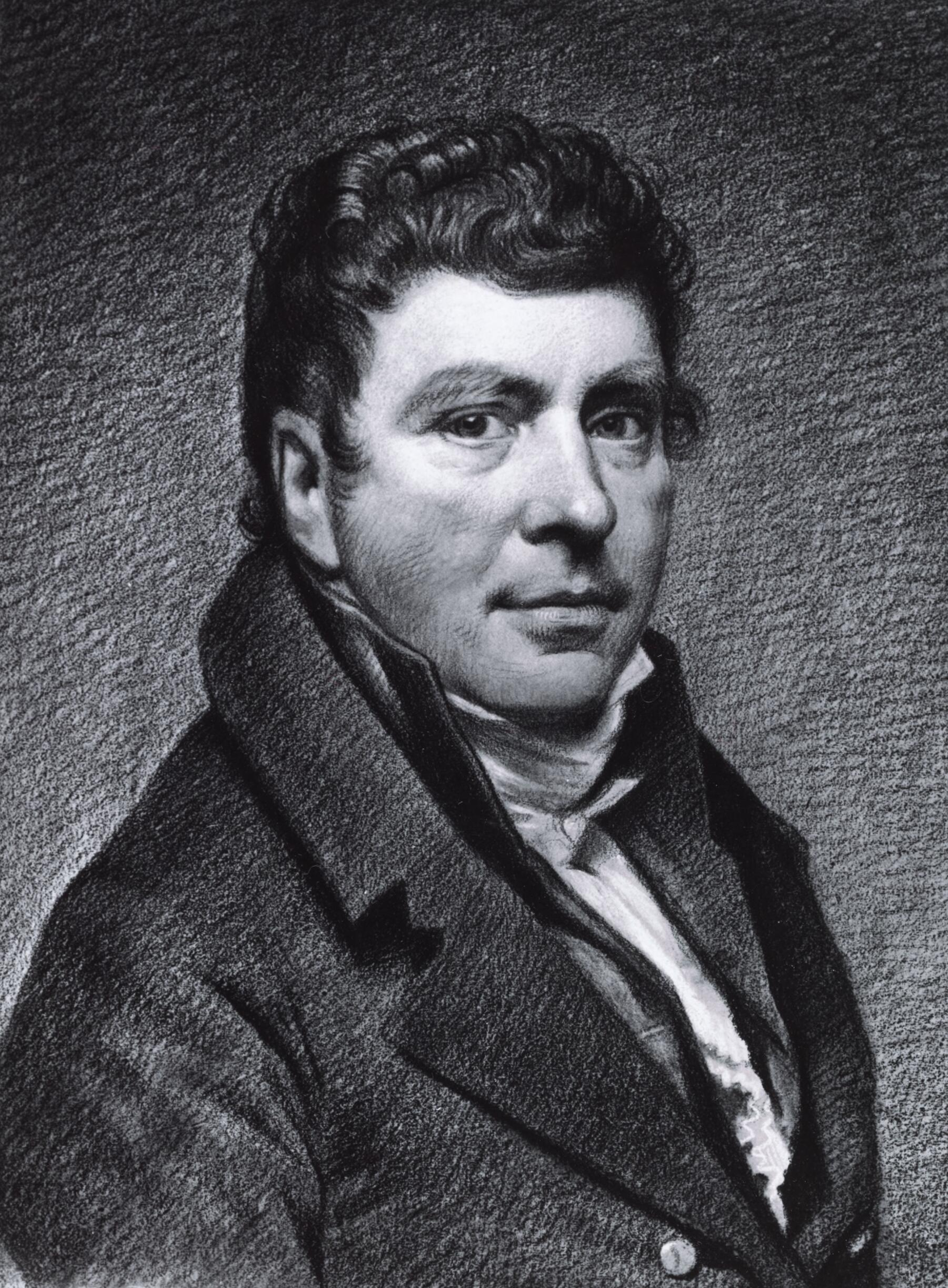 Selsportret fan Willem Bartel van der Kooi